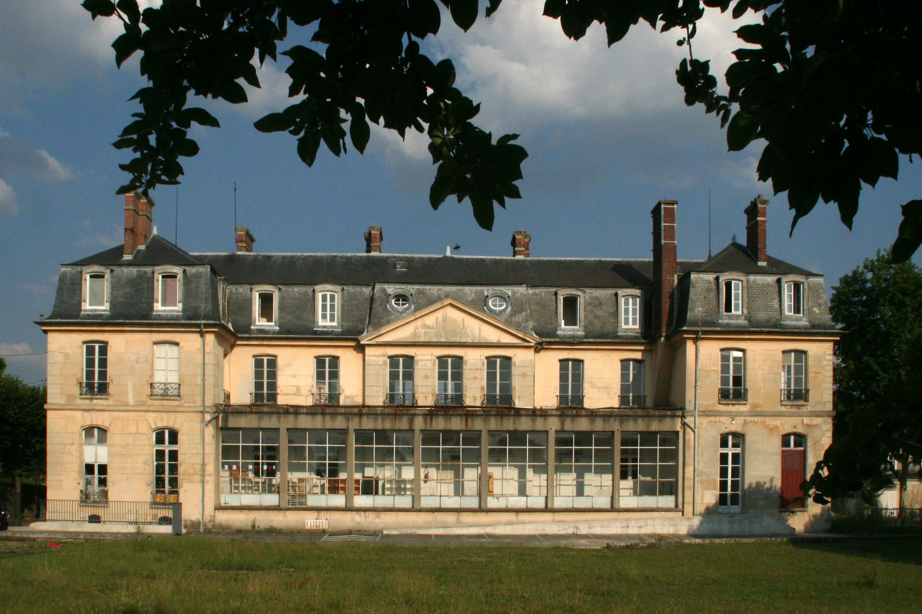 Façade coté jardin du Château du dernier seigneur et premier maire de Croissy-sur-Seine